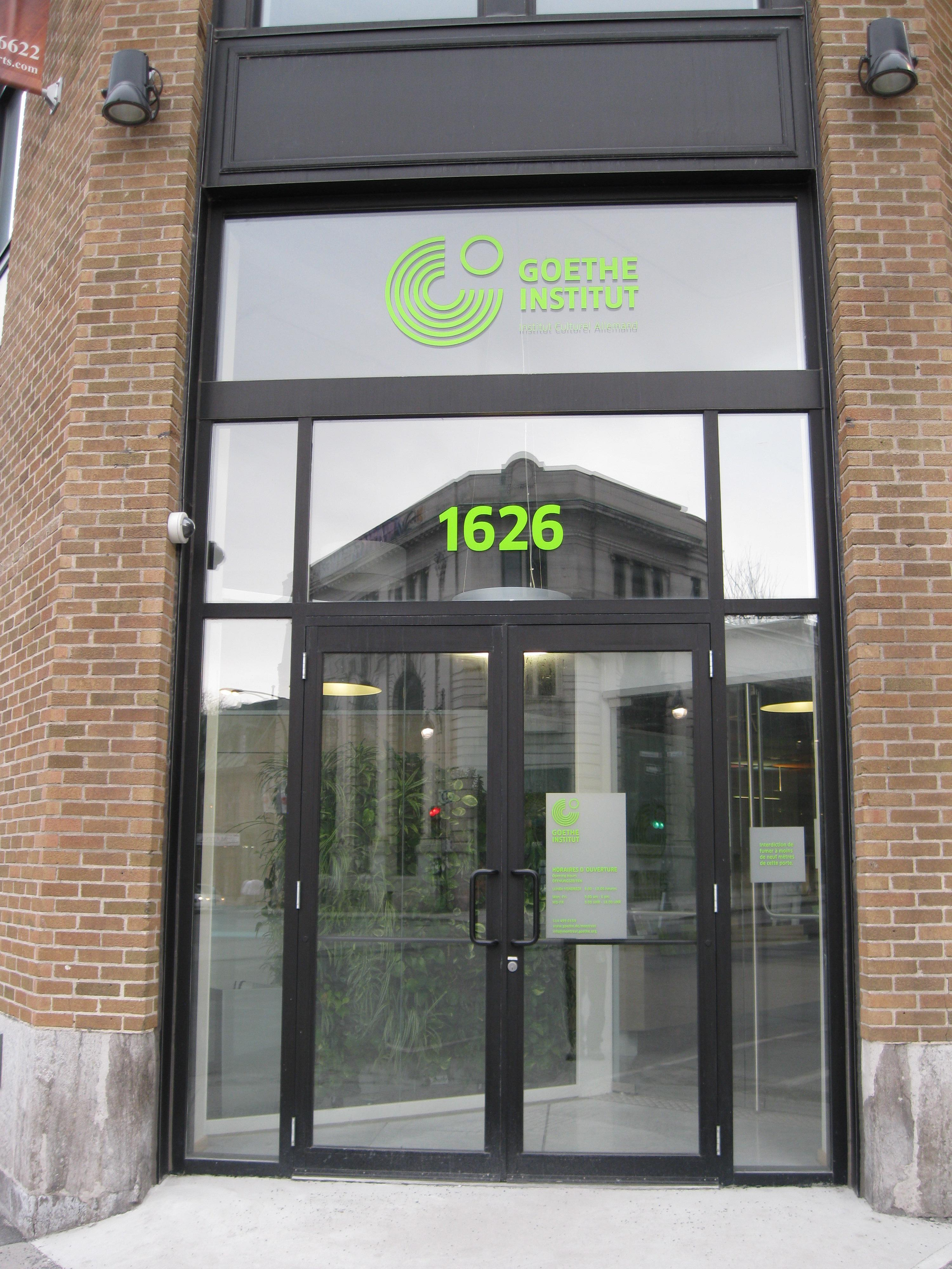 Goethe-Institut, 1626, boulevard Saint-Laurent, Montréal